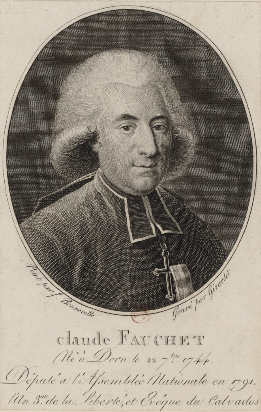 Claude Fauchet né à Dorn le 22 7.bre 1744 député à l'Assemblée nationale en 1791, l'an 3.me de la liberté, et evêque du Calvados, estampe.